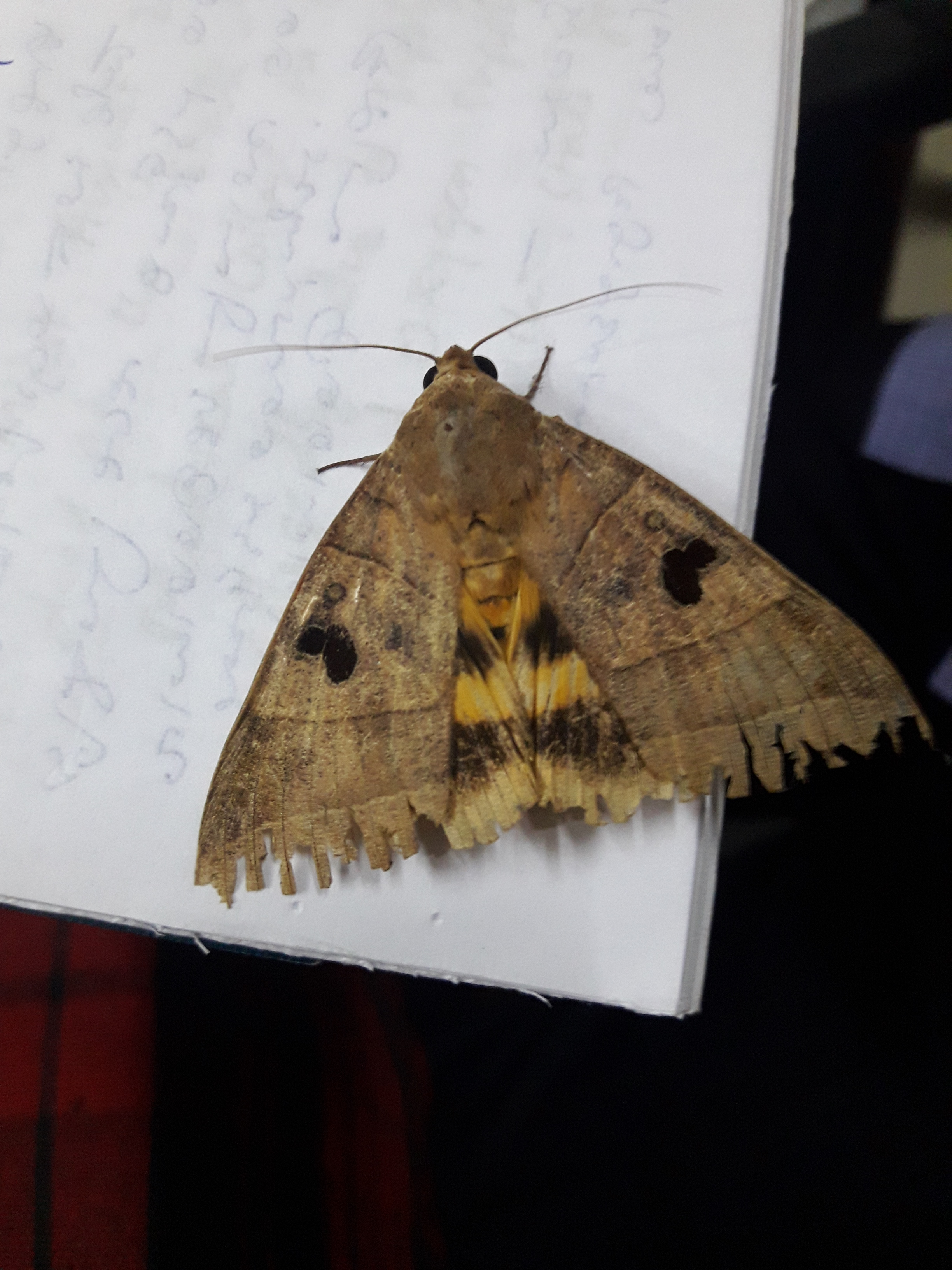 നിശാശലഭം